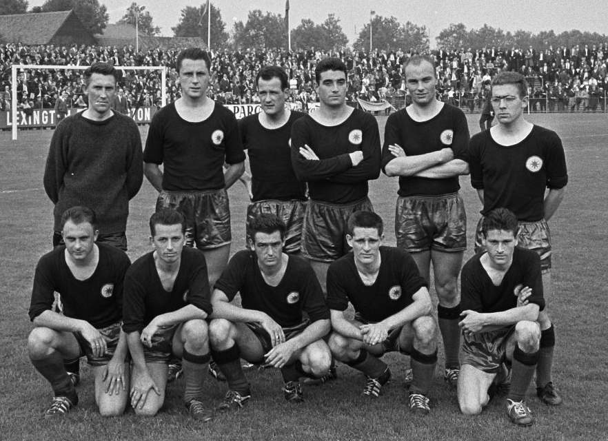 DHC tegen Excelsior 1-3. Elftal Excelsior